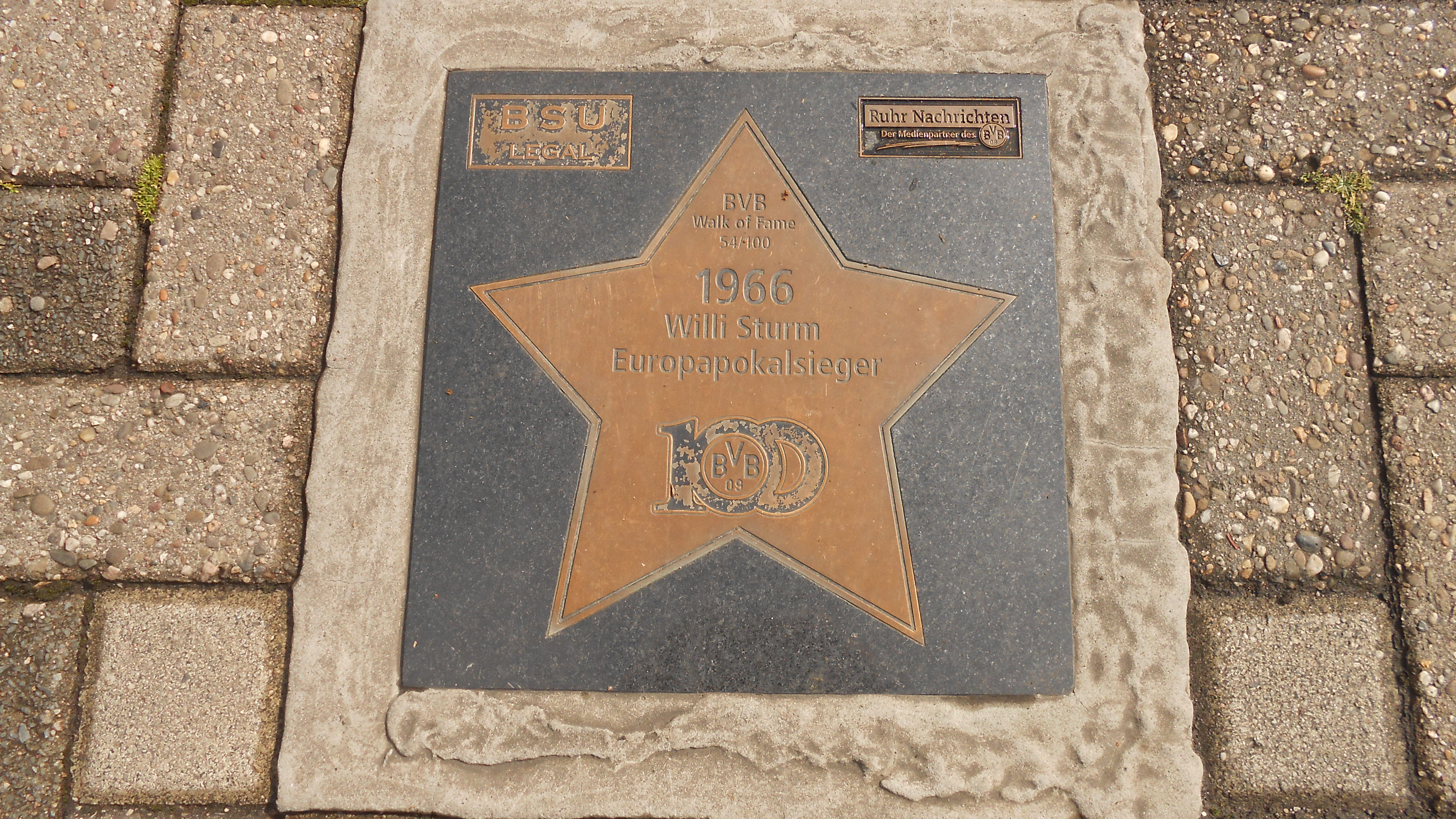 BVB Walk of Fame Nr. 54/100ː 1966 - Willi Sturm Europapokalsieger